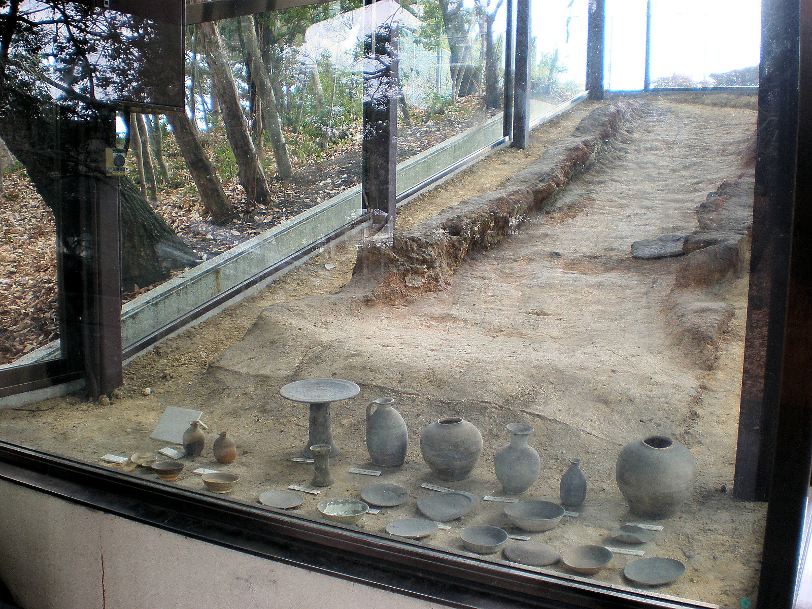 愛知県小牧市にある篠岡47号窯跡移設展示施設